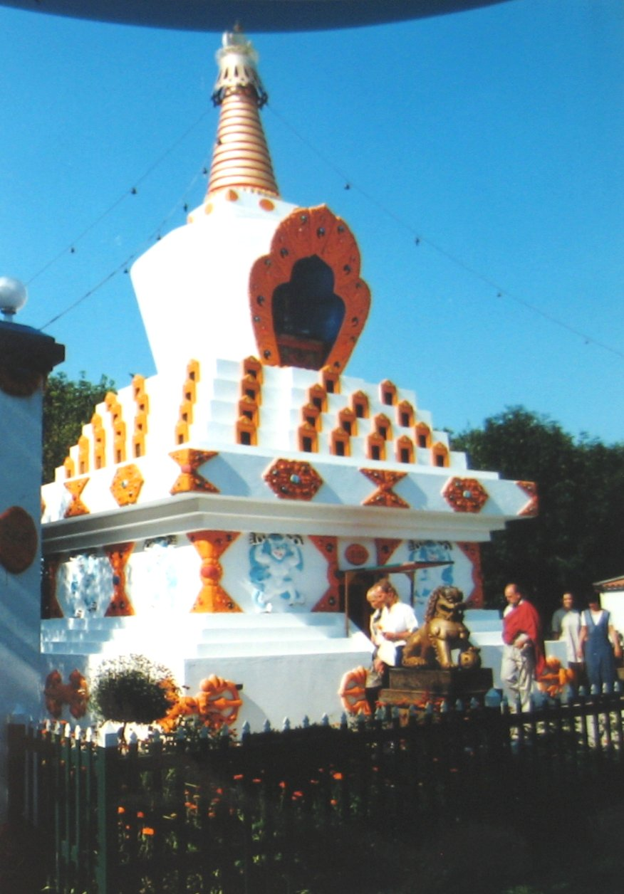 Een Stupa in Nederland